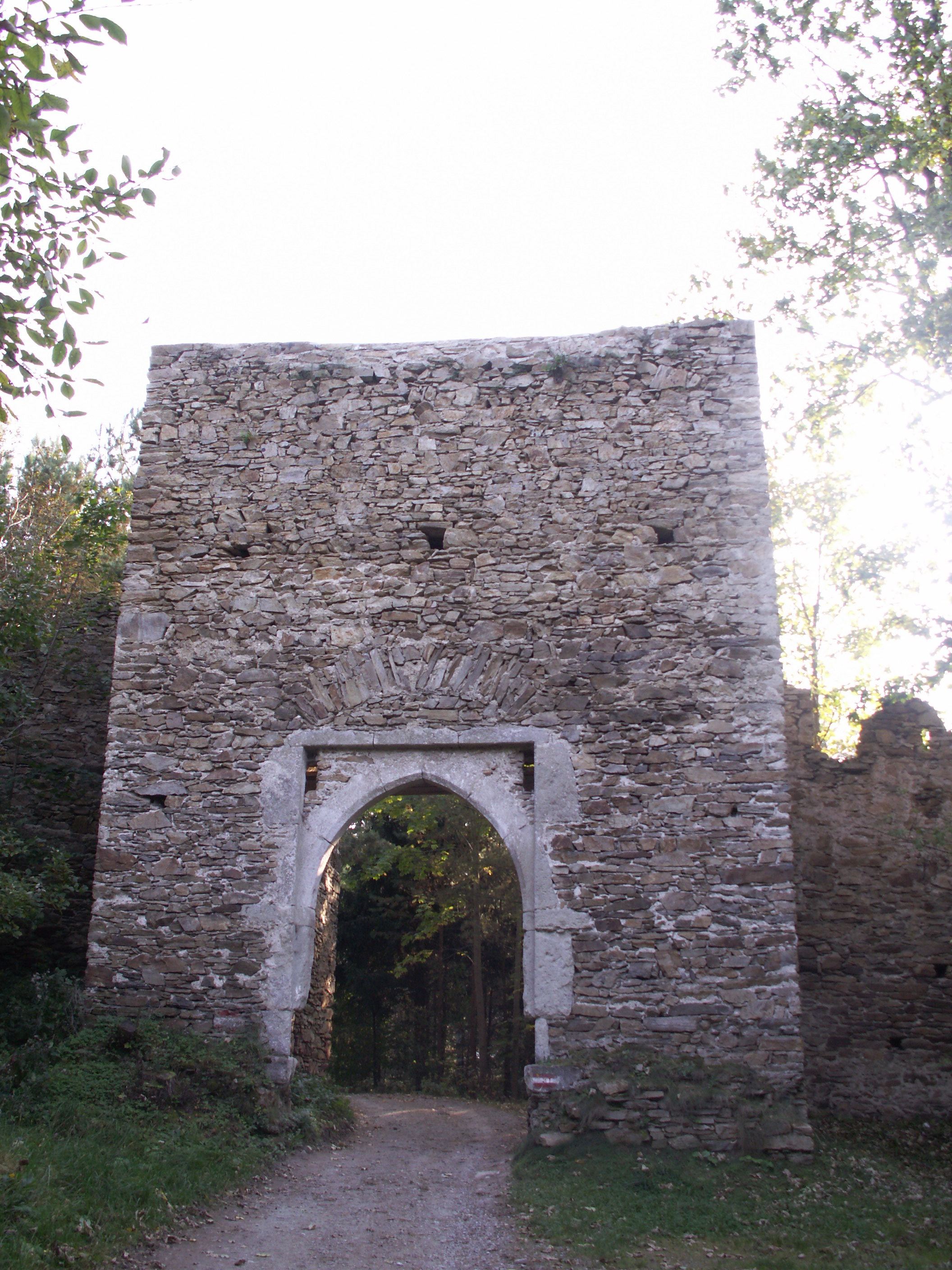 brána v tzv. "české zdi" u hradu Kollmitz (Rakousko)